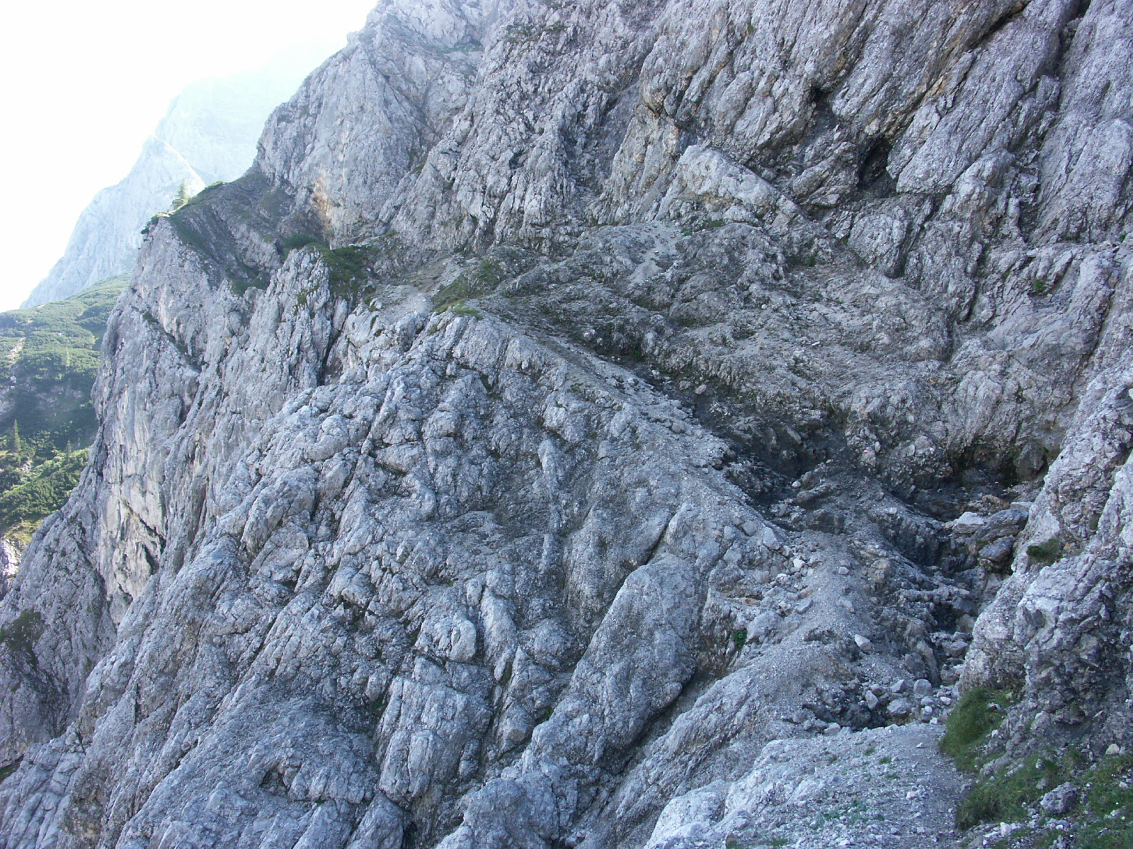 Climbing_Klettersteig_Alps_Karwendel_Gjaidsteig